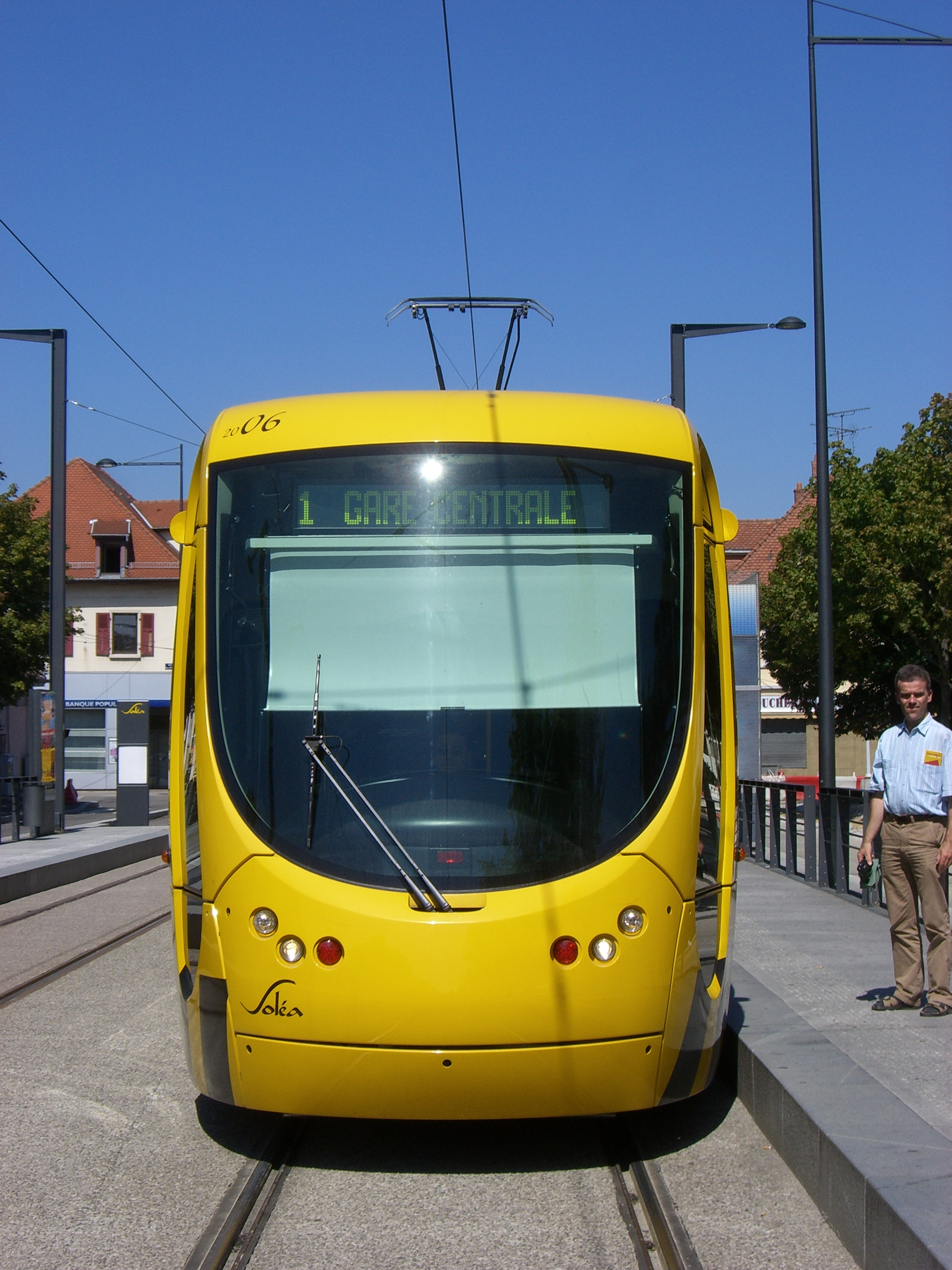 Mulhouse - Straßenbahn - Fahrzeugansicht - Frontalansicht